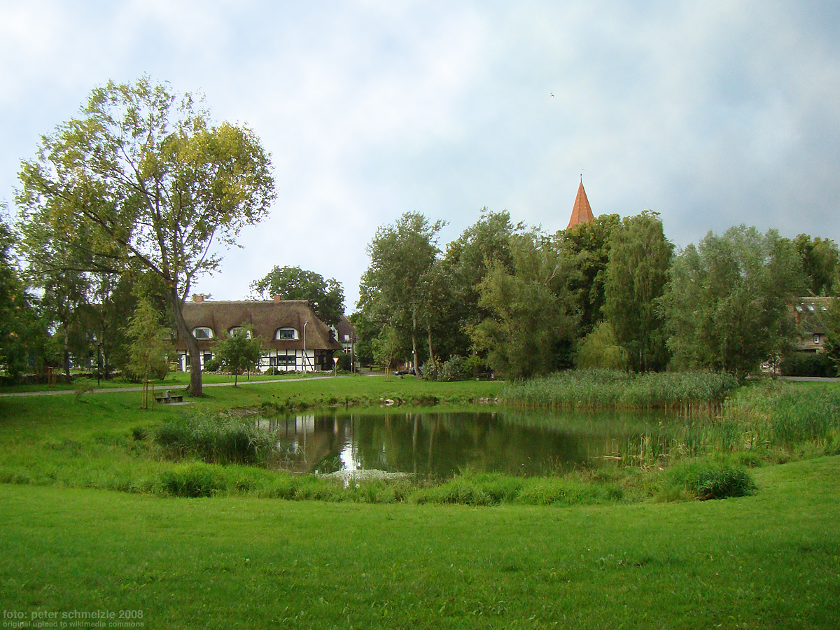 Teich in der Ortsmitte von Rostock-Biestow